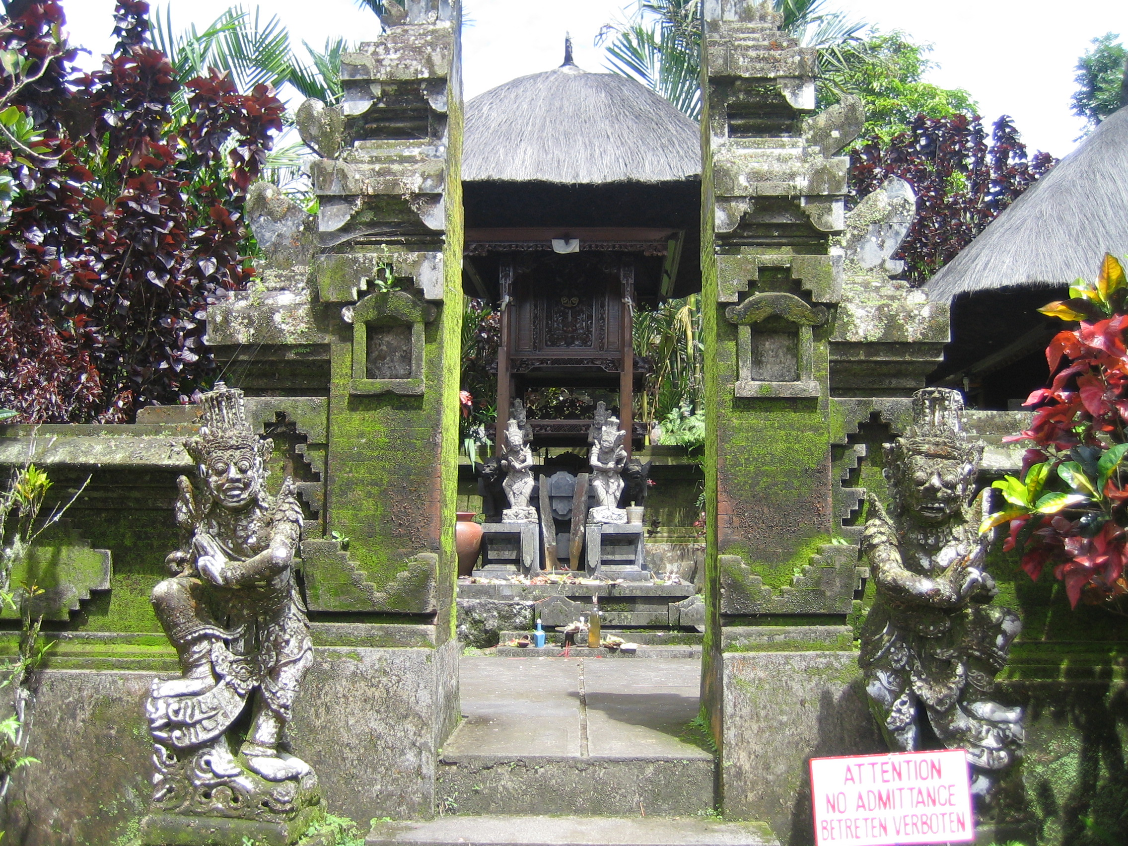 Indischer Tempel auf Bali